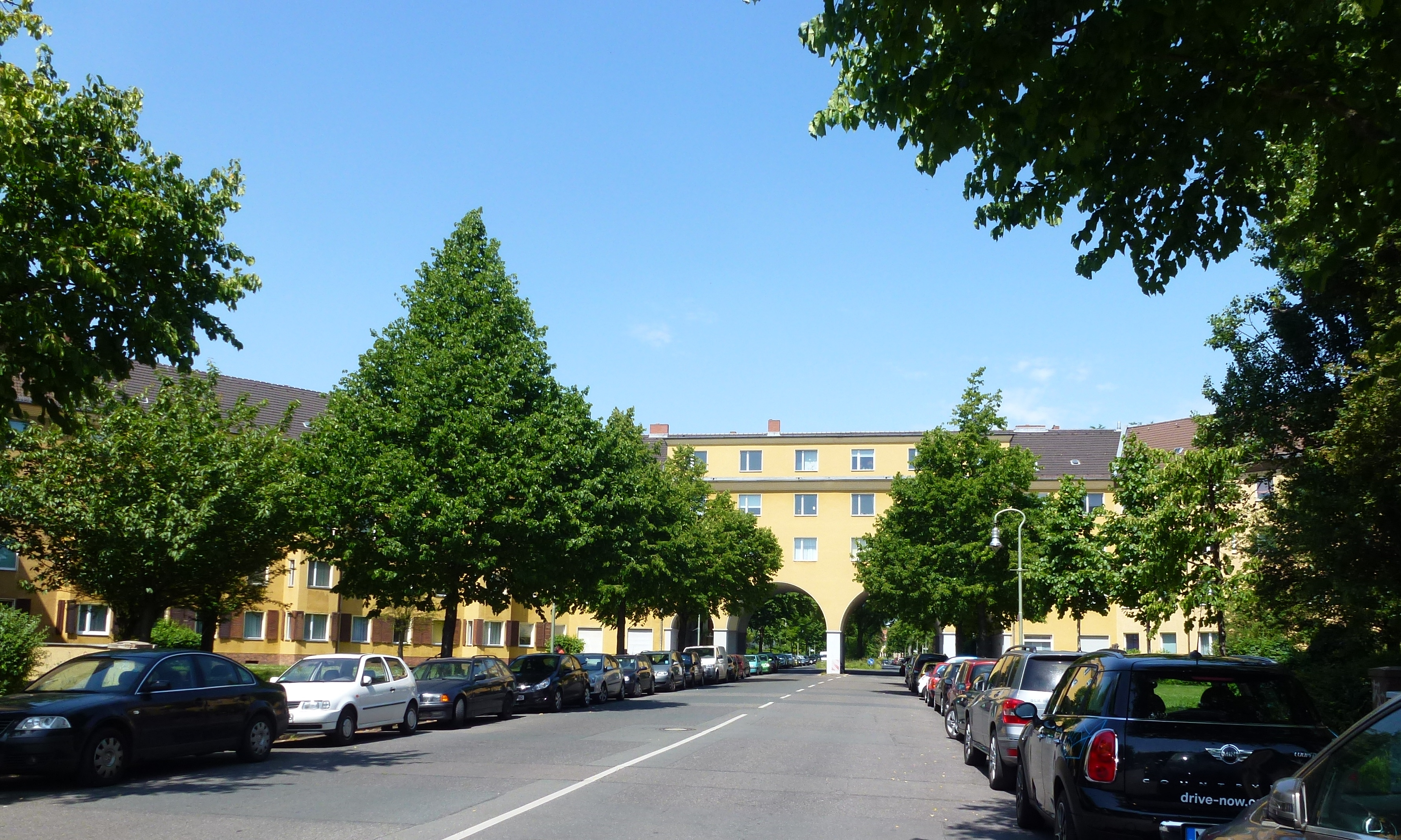 Berlin-Tempelhof Manfred-von-Richthofen-Straße